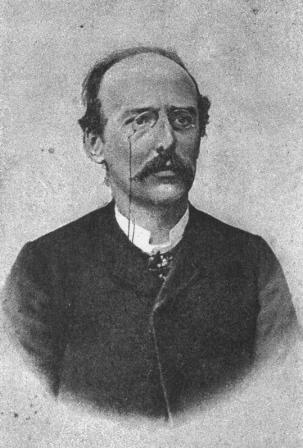 Pietro Merlo